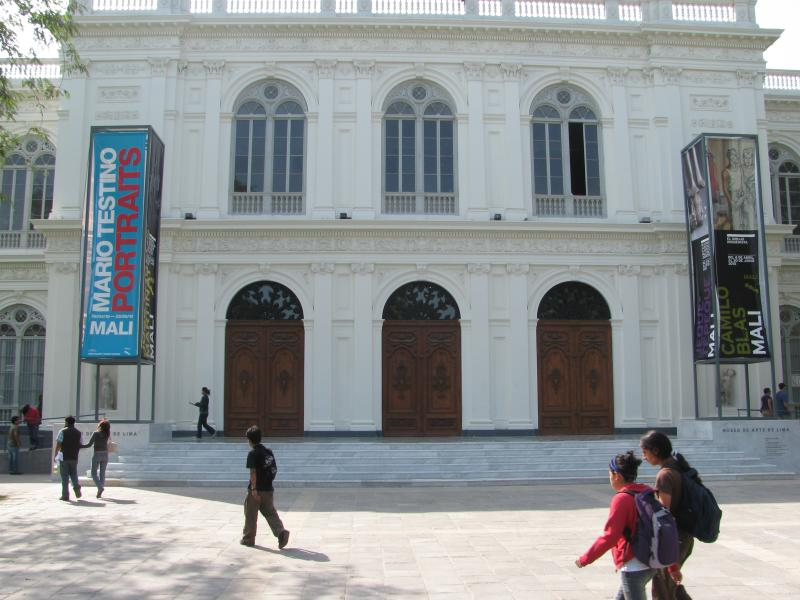 museo de arte de lima entrada